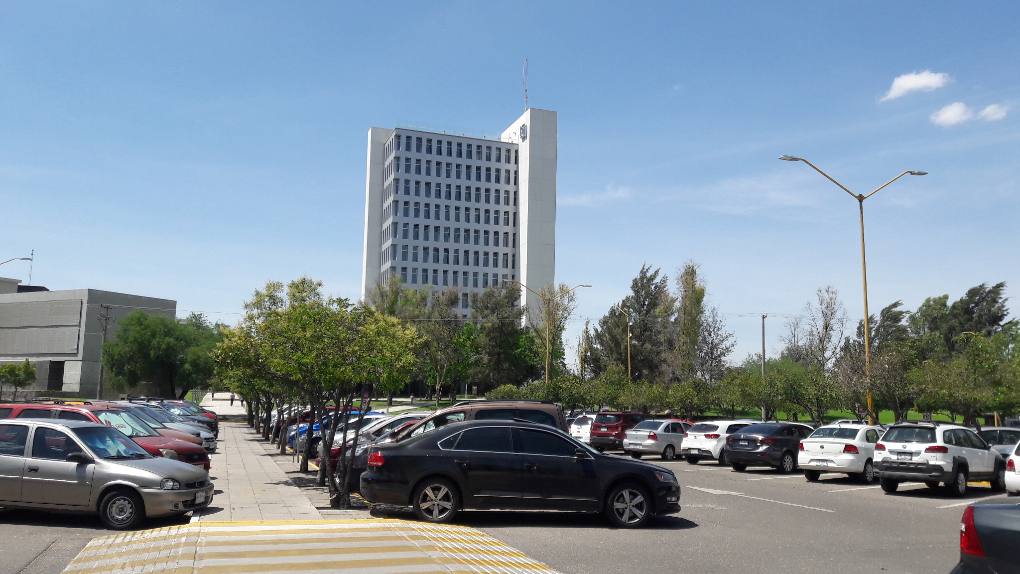 Vista del edificio académico administrativo de la Universidad Autónoma de Aguascalientes.